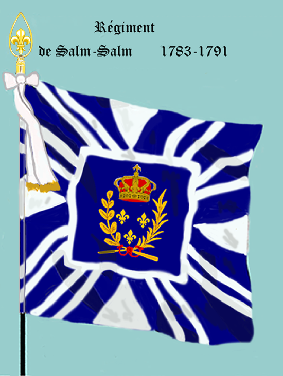 Ordonnanzfahne eines Fremdenregiments im königlich französischen Dienst. - Entnommen und überarbeitet aus: „LES UNIFORMES ET LES DRAPEAUX DE L'ARMÉE DU ROI“ Marseille 1899. (Drapeau d'Ordonnance d' un régiment etranger au service française.)